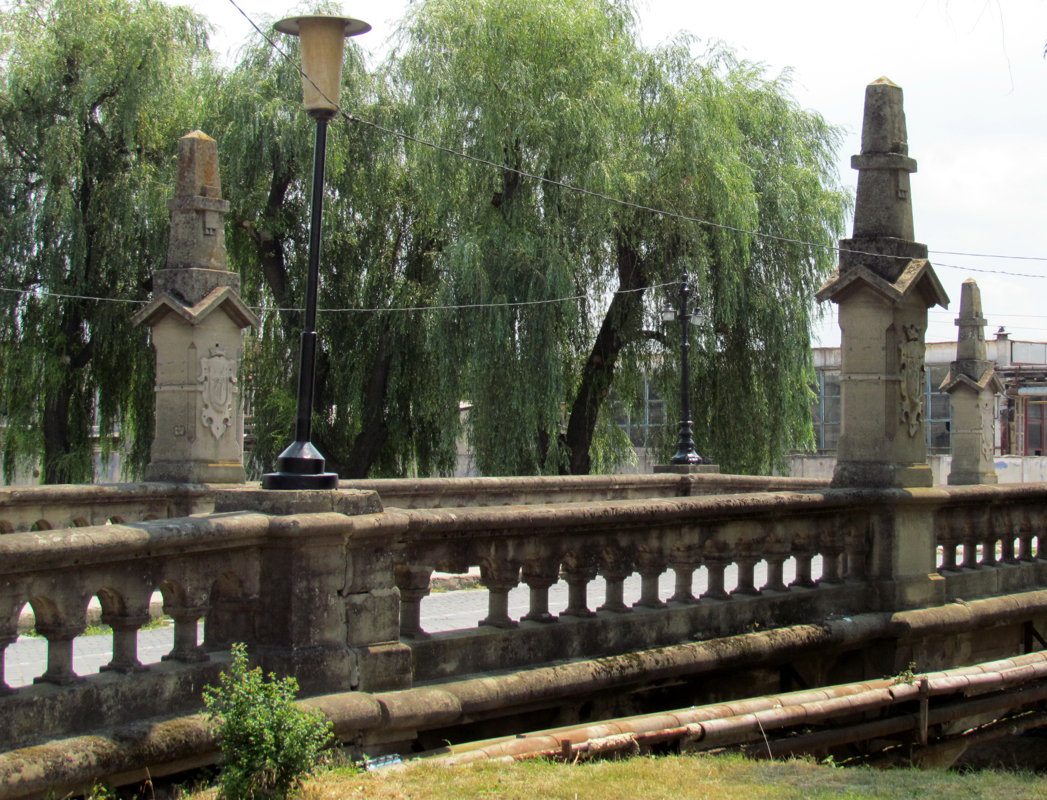 Pod de piatră